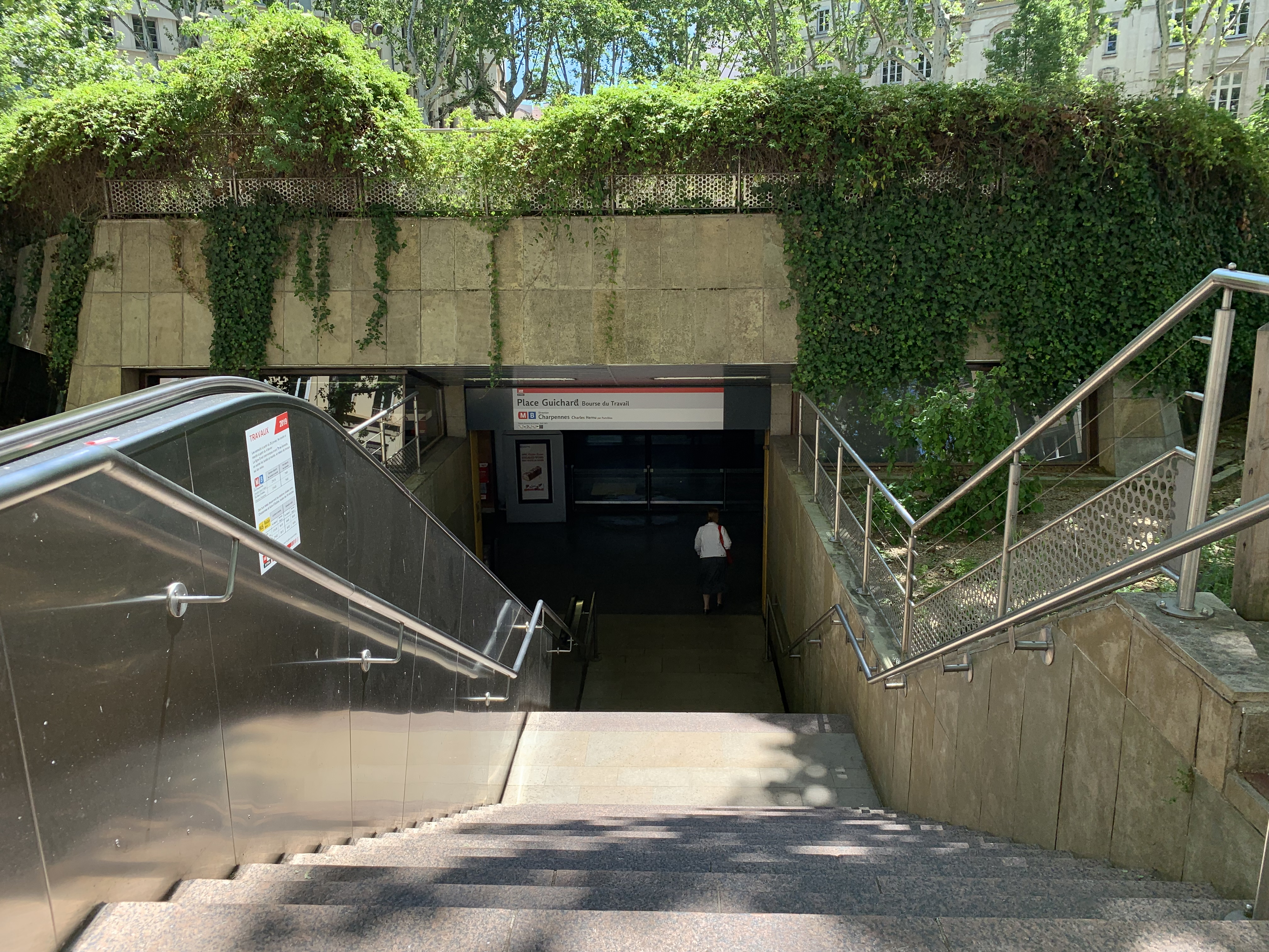 Entrée de la station de métro de la Place Guichard à Lyon (mai 2019).